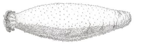 Holothuria glaberrima Selenka, 1867